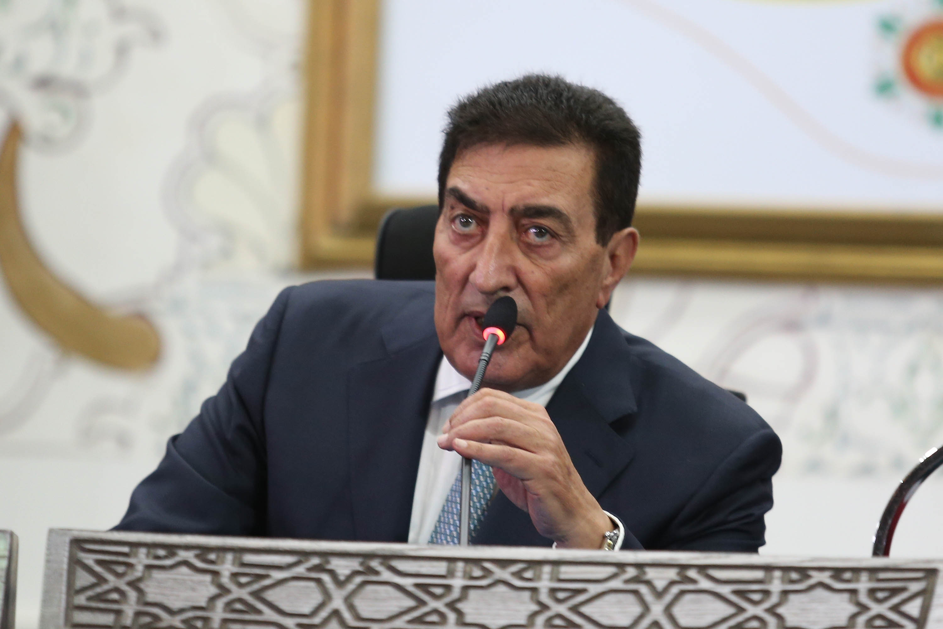 جلسة مجلس النواب الأردني بخصوص حادثة البحر الميت يوم 5/11/2018